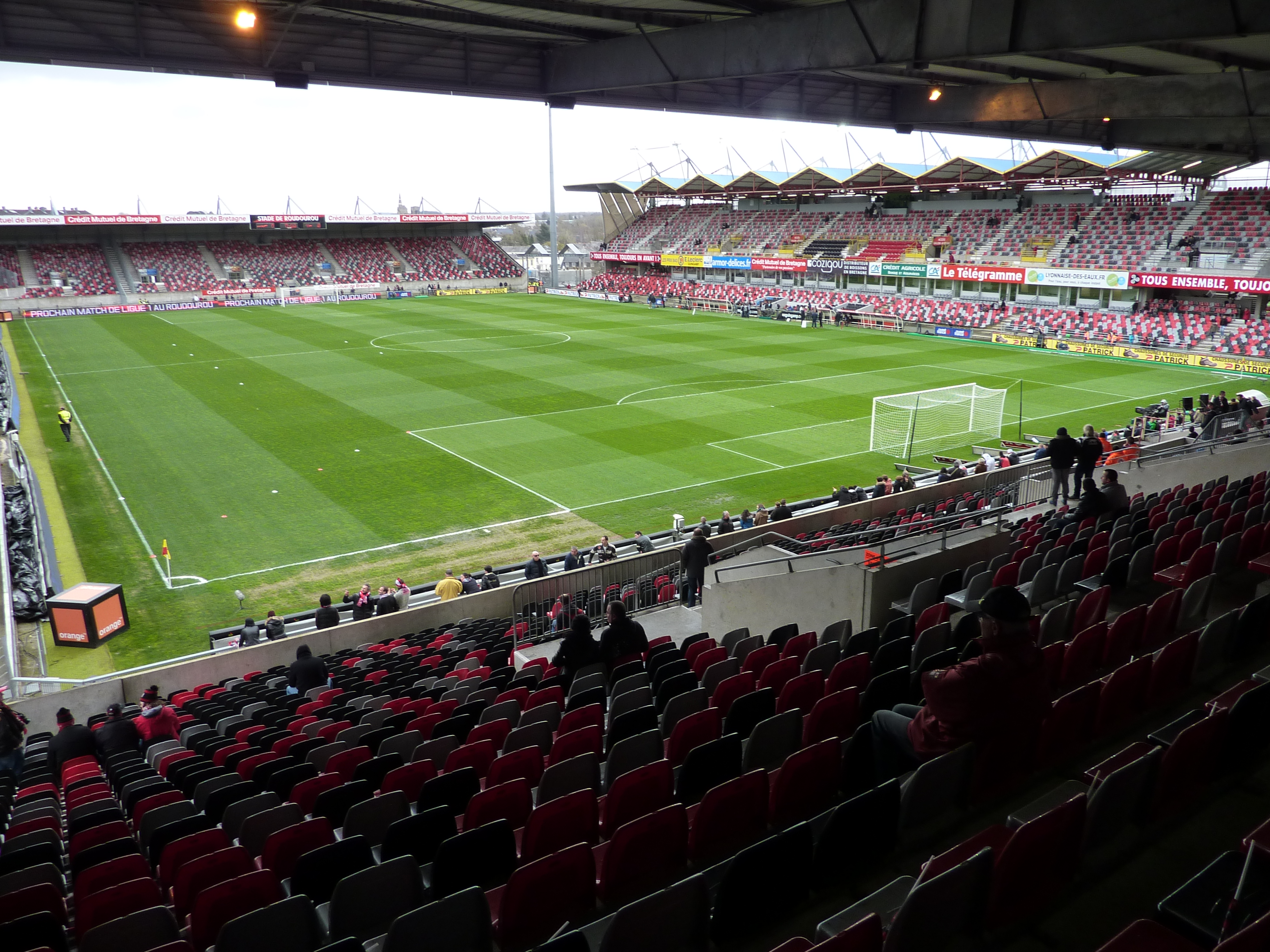 Le stade de Roudourou vu depuis la tribune Ouest.